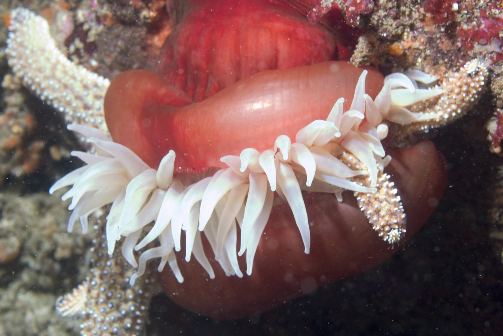 Anémona Urticina piscivora comiéndose una estrella de mar Pisaster giganteus